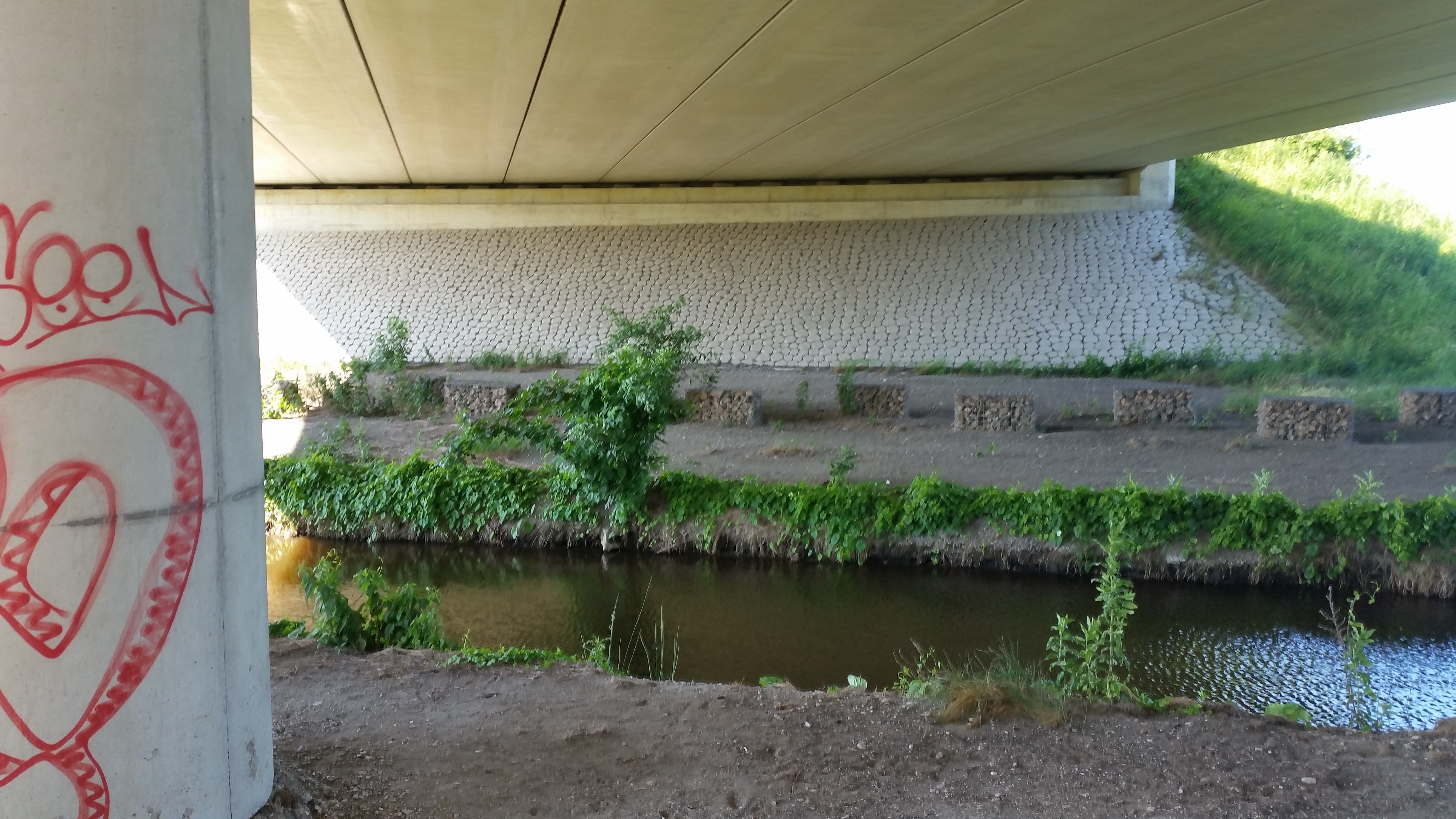 Viaduct Westrandweg - Osdorperweg